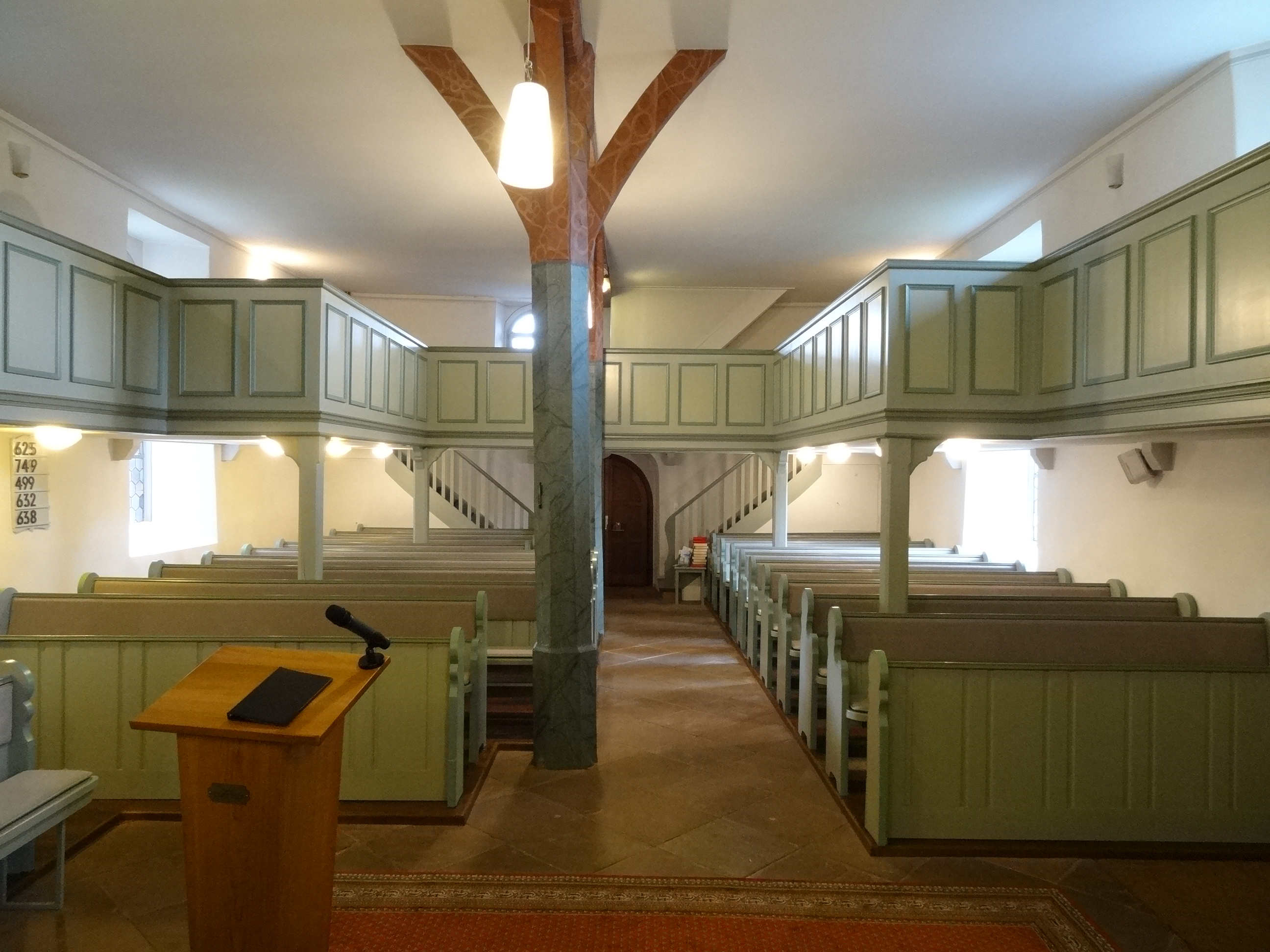 Evangelische Kirche Garbenteich